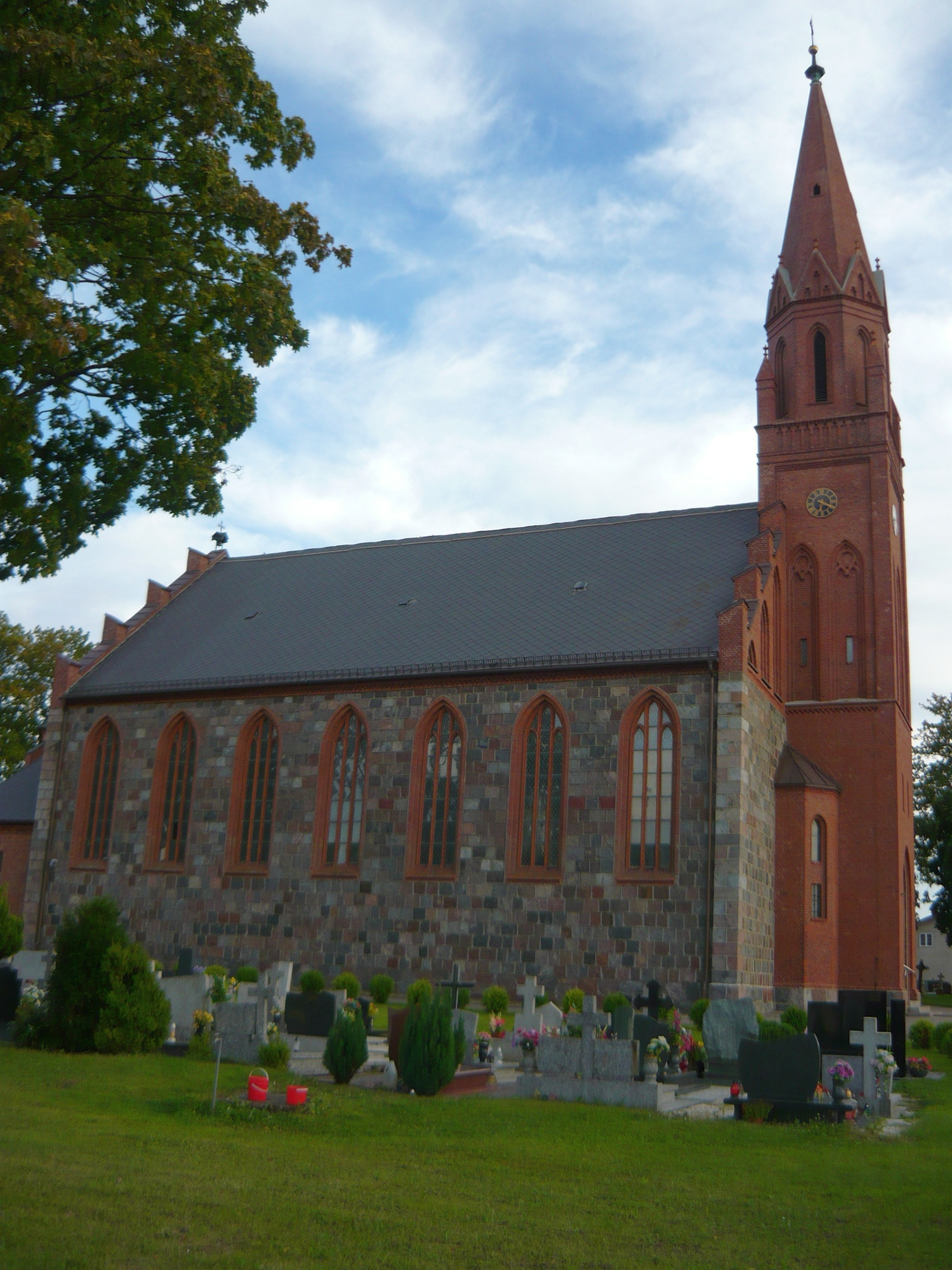 Przodkowo - neogotycki rzymskokatolicki kościół parafialny p.w. św. Andrzeja Boboli, 1874-1878 (zbudowany z ciosanych kamieni)